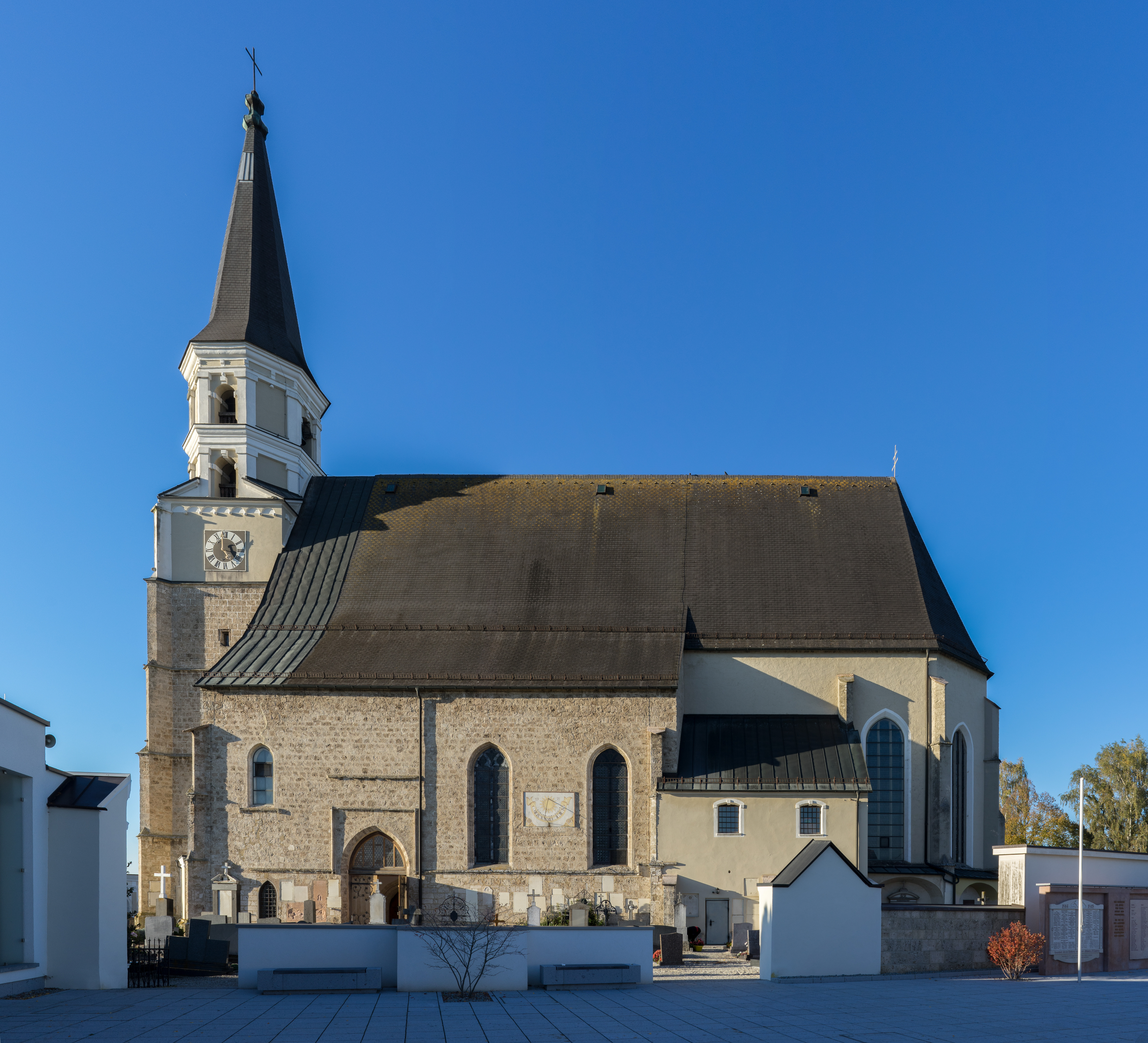 Kath. Pfarrkirche hl. Laurenz und Friedhof. Südseite